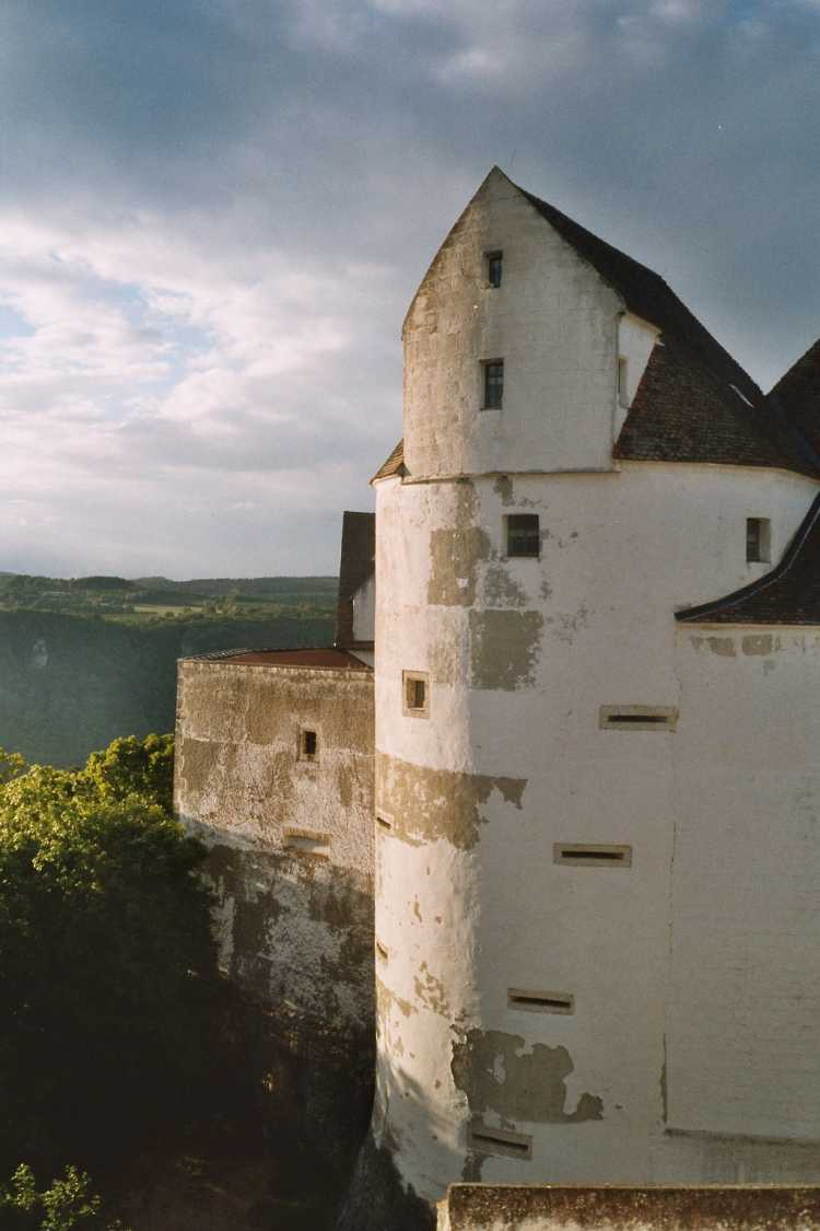 Burg Wildenstein am Donaudurchbruch